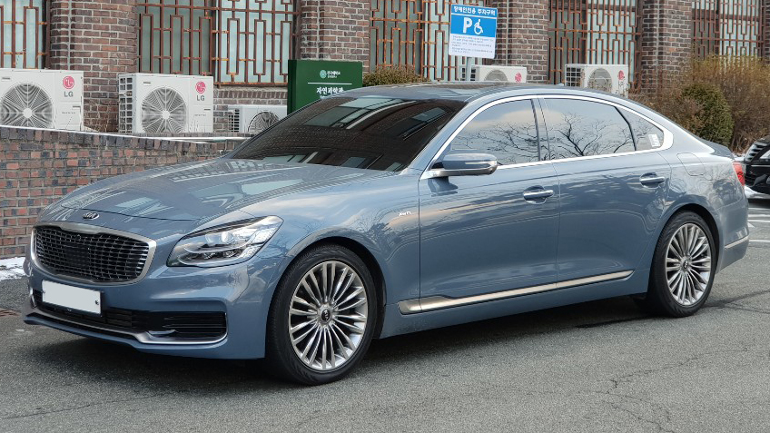 기아 K9 정측면